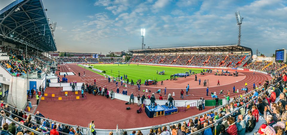 Tretra